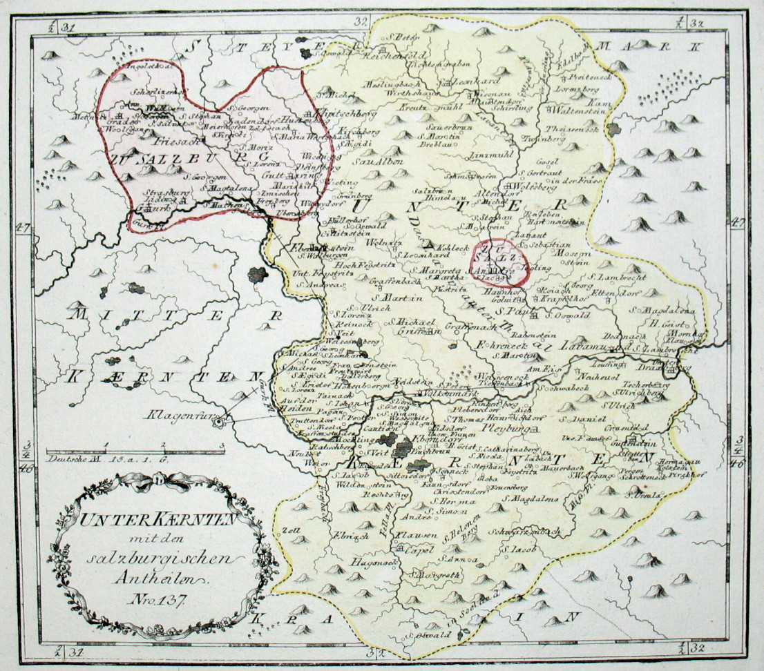 Unter-Kaernten mit den salzburgischen Antheilen. Nro. 137. Kolorierter Kupferstich